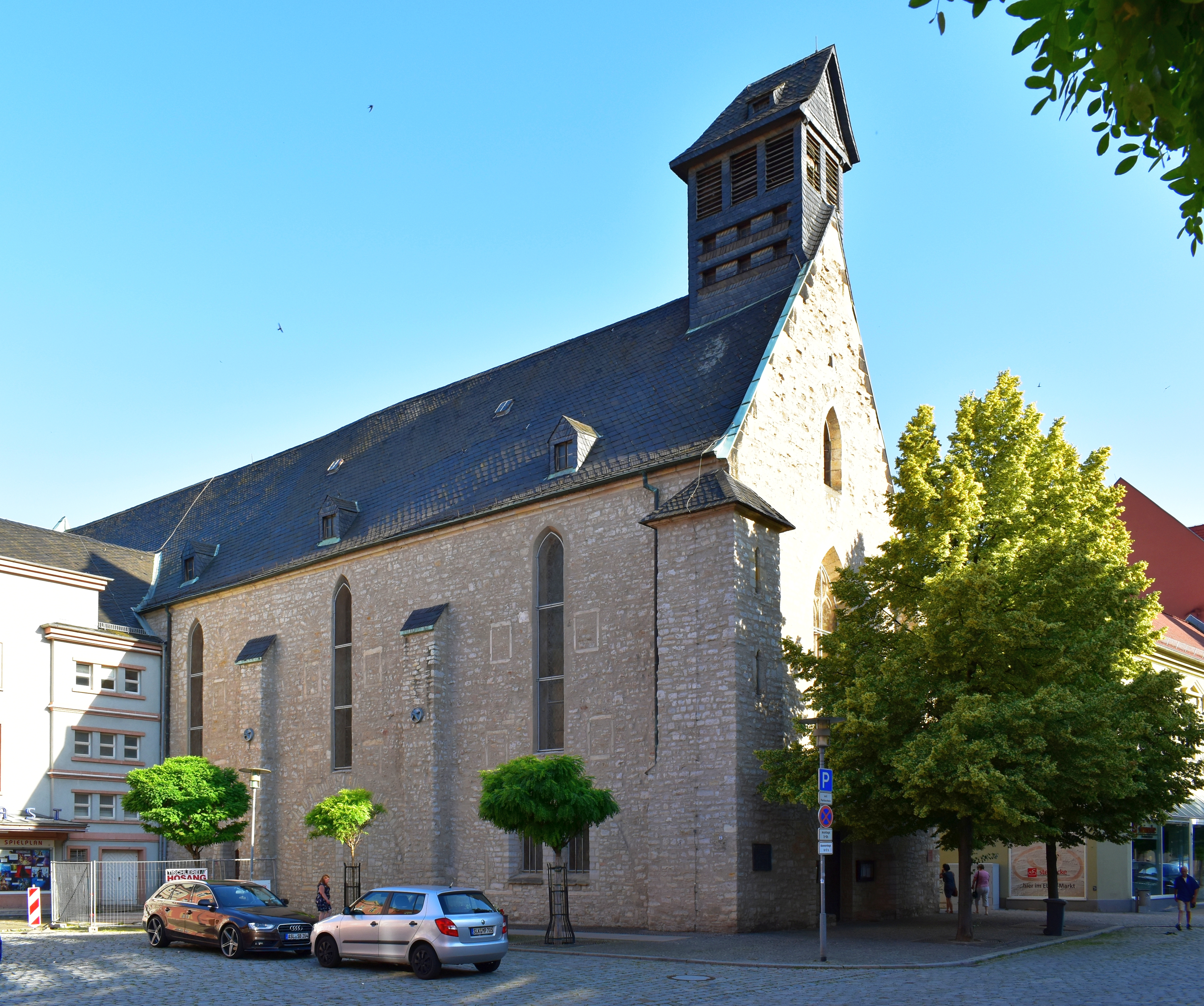 Heilig-Kreuz-Kirche am Markt 19 in Aschersleben